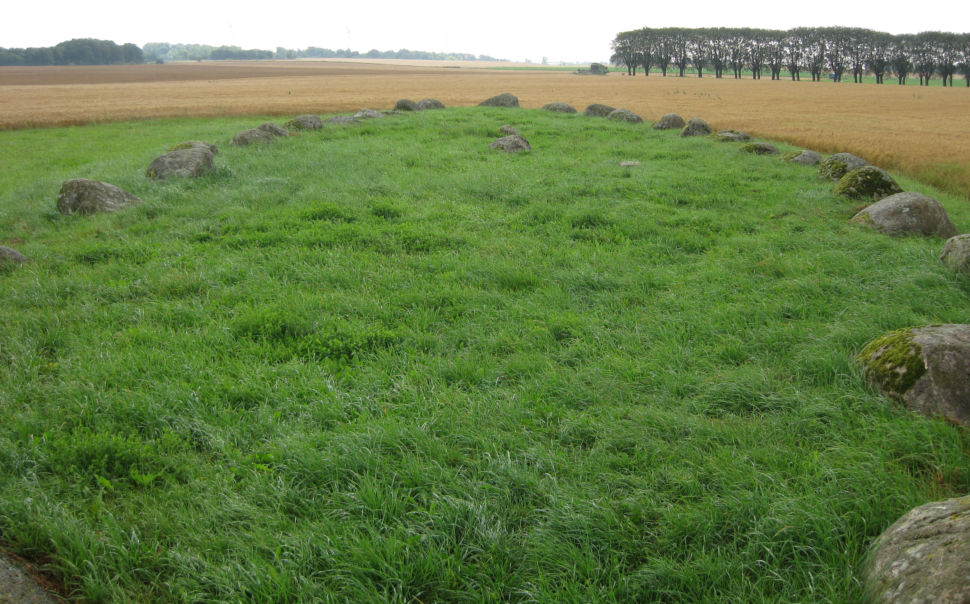 Skeppssättningen Stenhed på Österlen i Skåne